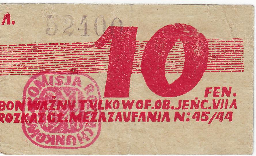 Bon, pieniadz zastepczy w Oflagu Murnau VII A.